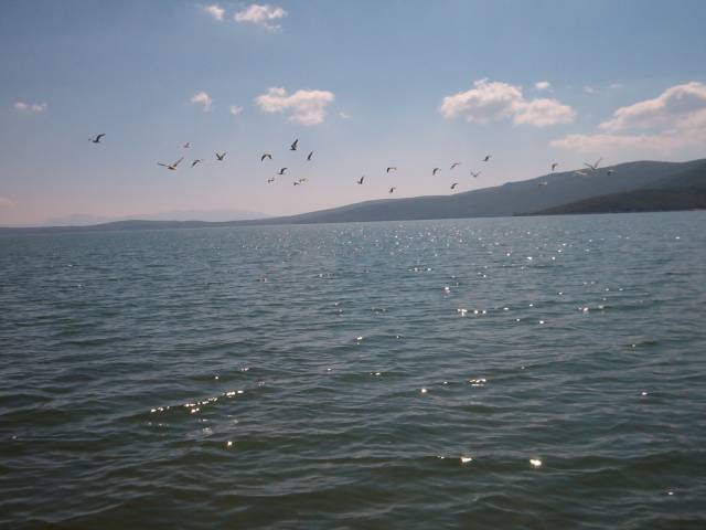 Buško jezero